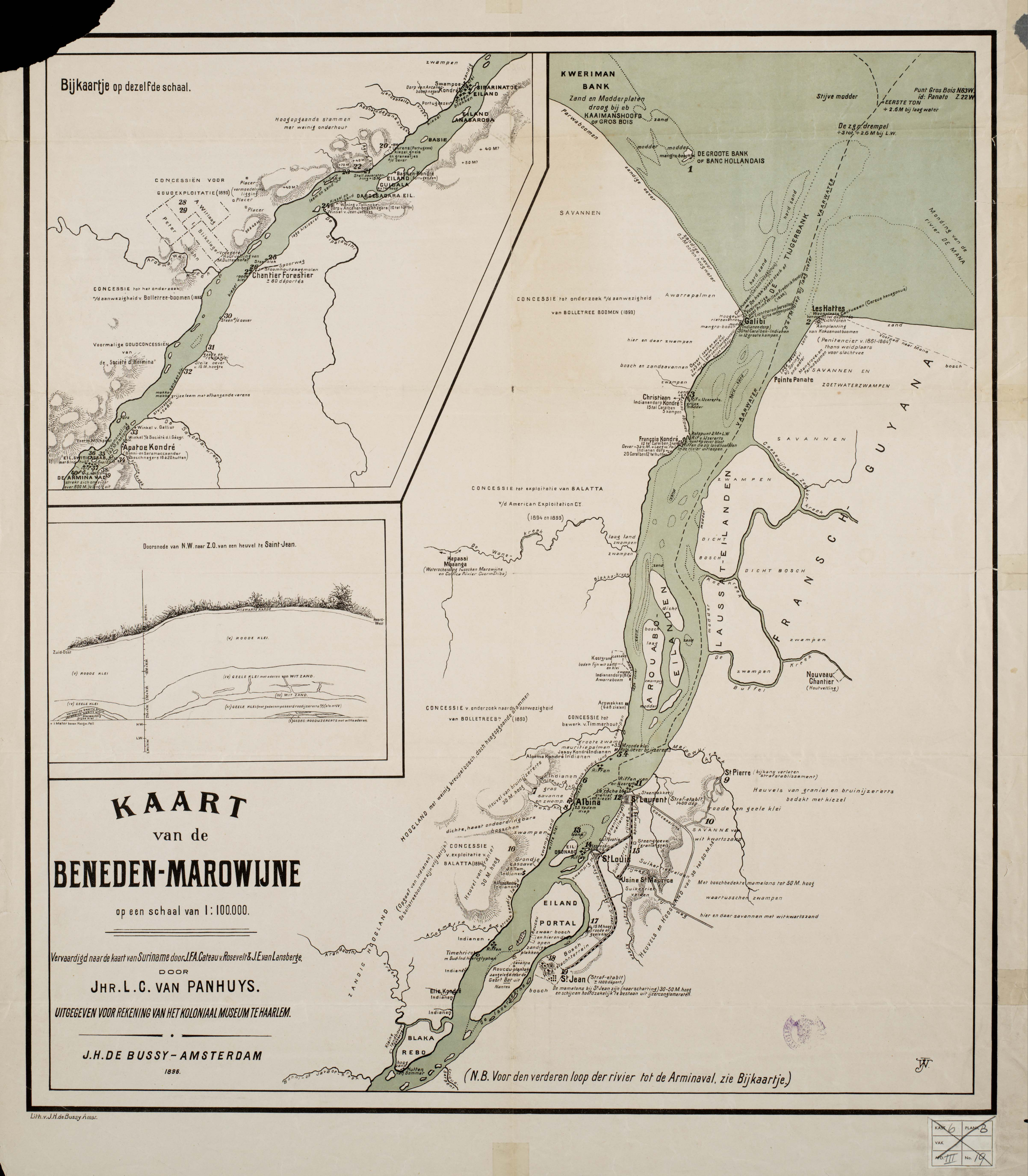 Deze gedetailleerde overzichtskaart van de Beneden Marowijne (en daarmee de grens met Frans Guyana) werd opgenomen in De Indische Mercuur van 18 januari 1896. Het inzetkaartje is een voortzetting van de hoofdkaart in zuidwestelijke richting, stroomopwaarts. De doorsnede eronder betreft de heuvel te Saint-Jean, gelegen aan de Marowijne.